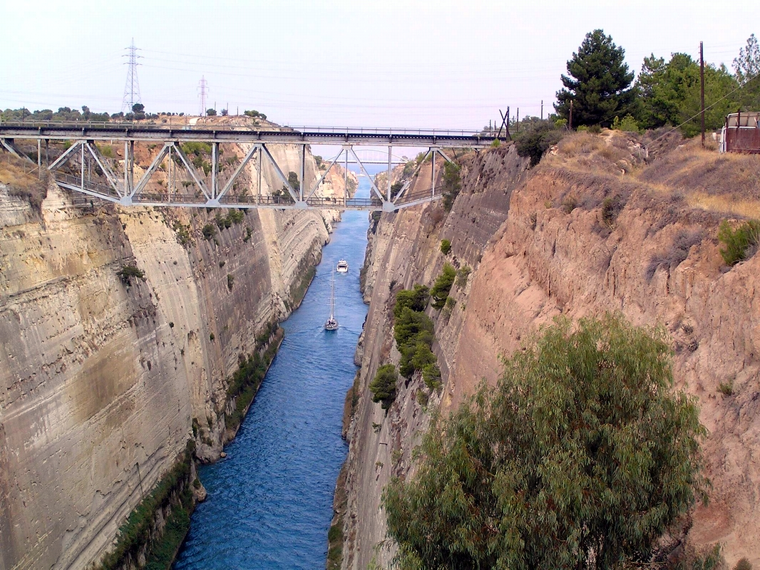 Коринтски Канал Ову сам фотографију направио током мог посета грчкој септембра 2005.